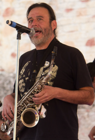 Cristián Crisosto en el FestivAlterNativo de Querétaro, México en el 2017, junto a MediaBanda